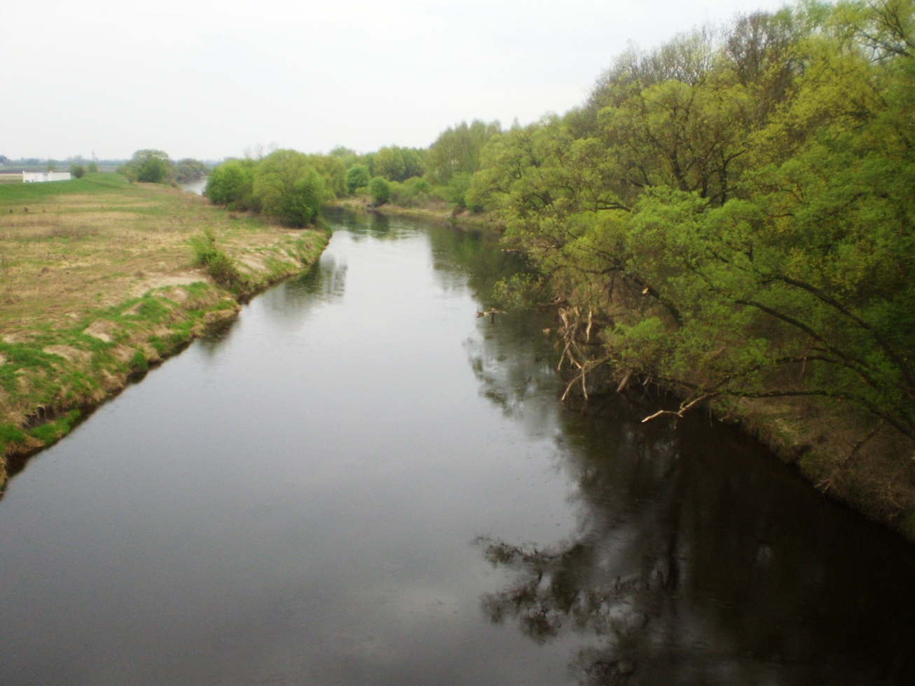 Nevėžis prie Vilainių, Kėdainių raj.